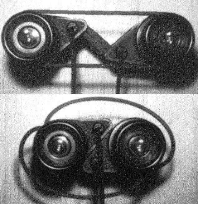 Kompaktes Prismenfernglas von Zeiss (Oberkochen) mit zusätzlichem Band zur synchronen Einstellung der Entfernung